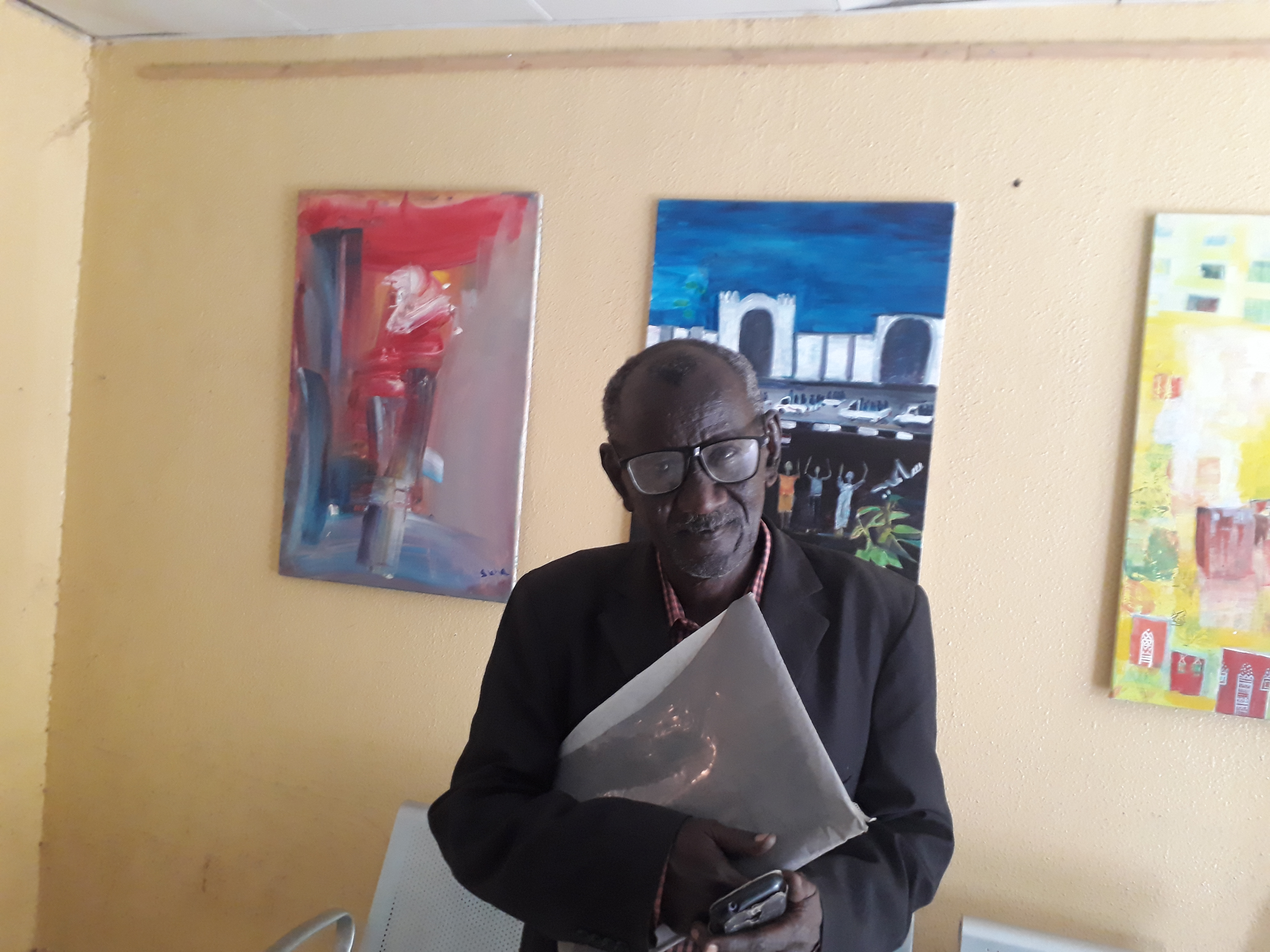 الروائي محمد خير عبد الله هو كاتب وقاص سوداني له العديد من القصص القصيرة المنشورة فضلاً عن الروايات